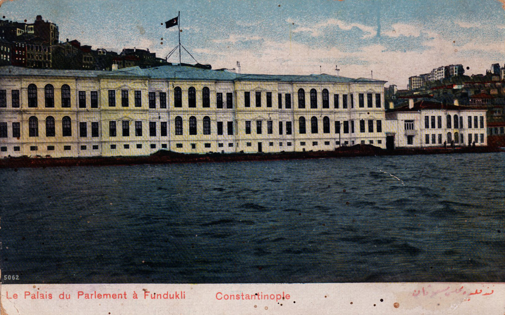 The Twin Palaces on the seaside of Meclis-i Mebusan Street were built by the architect Garabet Amira Balyan on the order of Sultan Abdülmecit for his two daughters Cemile Sultan and Münire Sultan between 1856-1859. Cemile Sultan Palace served as parliaments “Meclis-i Mebusan” and “Meclis-i Ayan” during the late Ottoman period. In 1926 it became the Academy of Fine Arts. The archives and library were destroyed along with the building in a fire in 1948. After reconstruction, led by Sedad Hakkı Eldem, the palace reopened in 1953 and was used as a military headquarters. Today these two buildings are home to Mimar Sinan Fine Arts University. SALT Research, Ali Saim Ülgen Archive Çifte Saraylar, Sultan Abdülmecit tarafından, kızları Cemile Sultan ve Münire Sultan’ın adına 1856-1859 yıllarında mimar Garabet Amira Balyan’a yaptırıldı. Bir dönem Meclis-i Mebusan ve Meclis-i Ayan olarak kullanılan Cemile Sultan Sarayı, 1926’da Güzel Sanatlar Akademisi’ne devredildi. 1948’de çıkan bir yangında arşiv ve kütüphanesi yok olan saray, Sedad Hakkı Eldem’in projesi doğrultusunda yeniden inşa edilerek 1953’te hizmete açıldı. Münire Sultan Sarayı ise, Cumhuriyet’in ilk yıllarında III. Kolordu Komutanlığı Karargahı olarak kullanıldı. Çeşitli eğitim kurumlarına ev sahipliği yaptıktan sonra 1970’te Güzel Sanatlar Akademisi’nin kullanımına verilen saray, Sedad Hakkı Eldem’in projesiyle yeniden inşa edilerek 1975’te hizmete açıldı. Binalar günümüzde Mimar Sinan Güzel Sanatlar Üniversitesi tarafından kullanılmaktadır. SALT Araştırma, Ali Saim Ülgen Arşivi